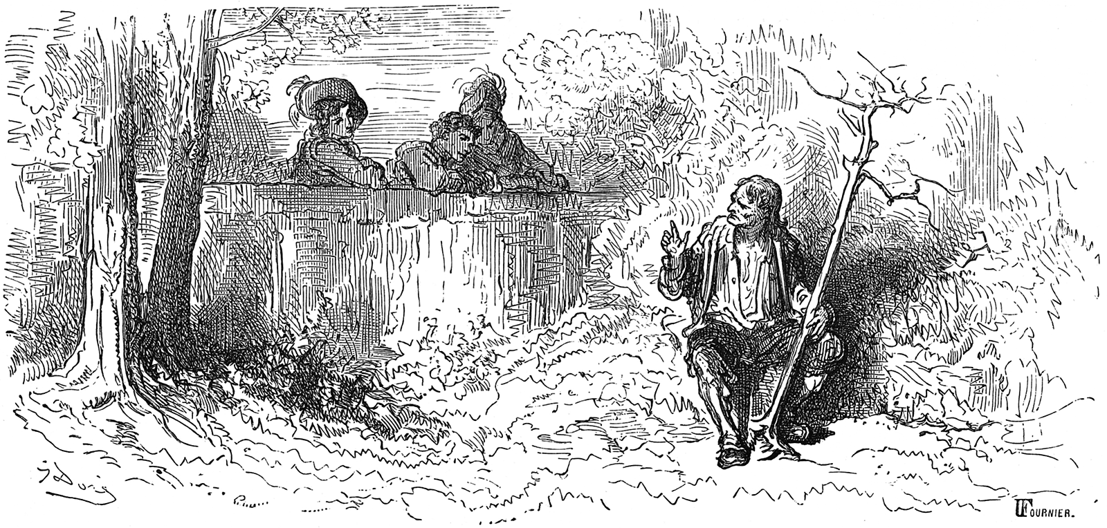 grafika z książki PL Bajki, Jean de La Fontaine, nakładem i drukiem Jana Noskowskiego, Warszawa 1876